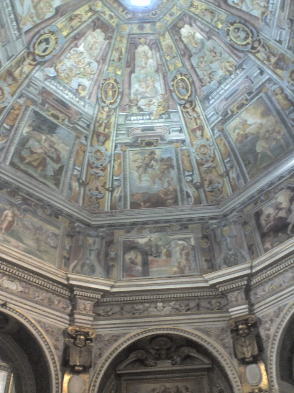 Casale Monferrato, chiesa di San Michele - Veduta interna della cupola